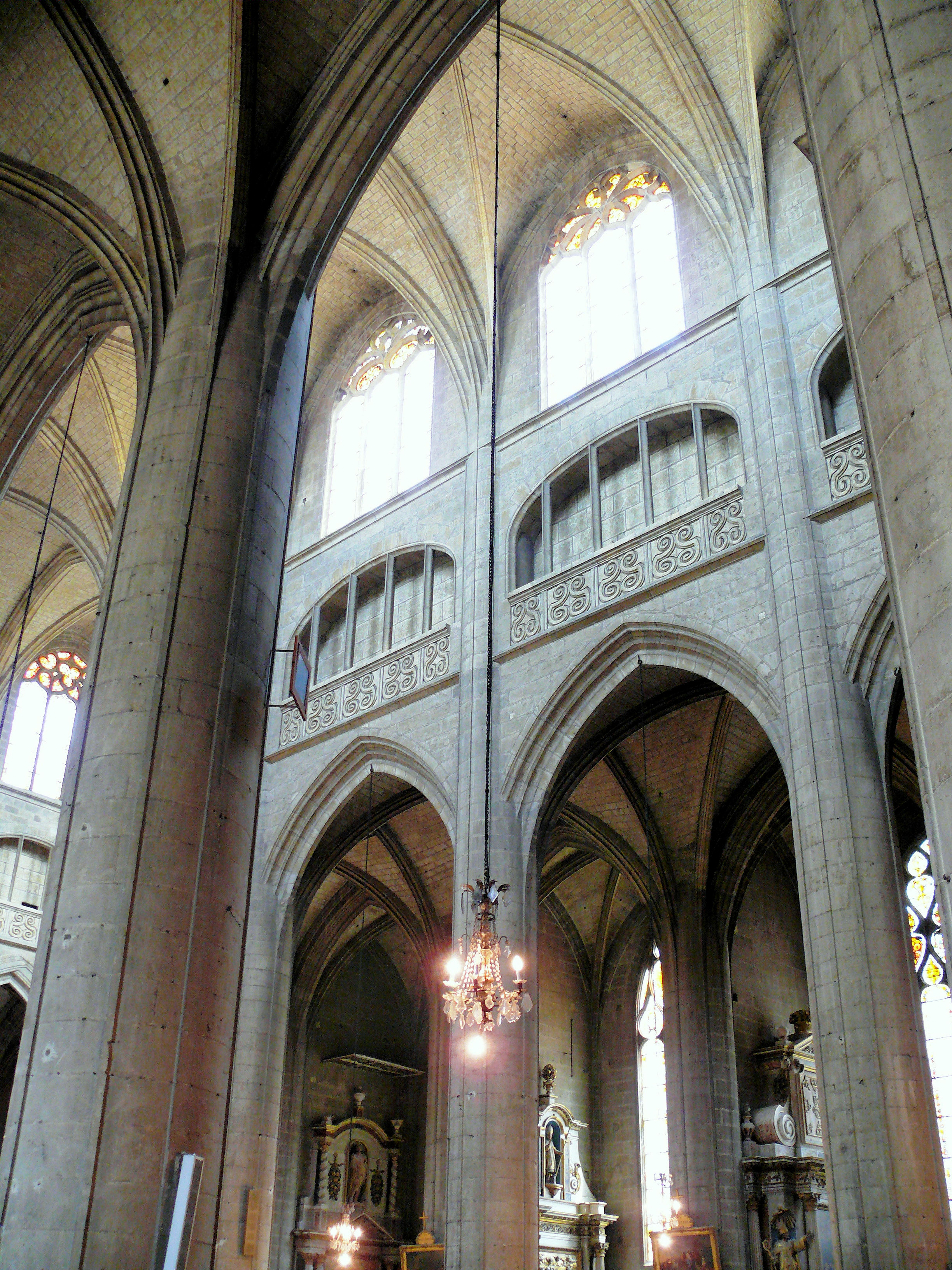 Cathédrale Sainte-Marie d'Auch - Elévation de la nef centrale